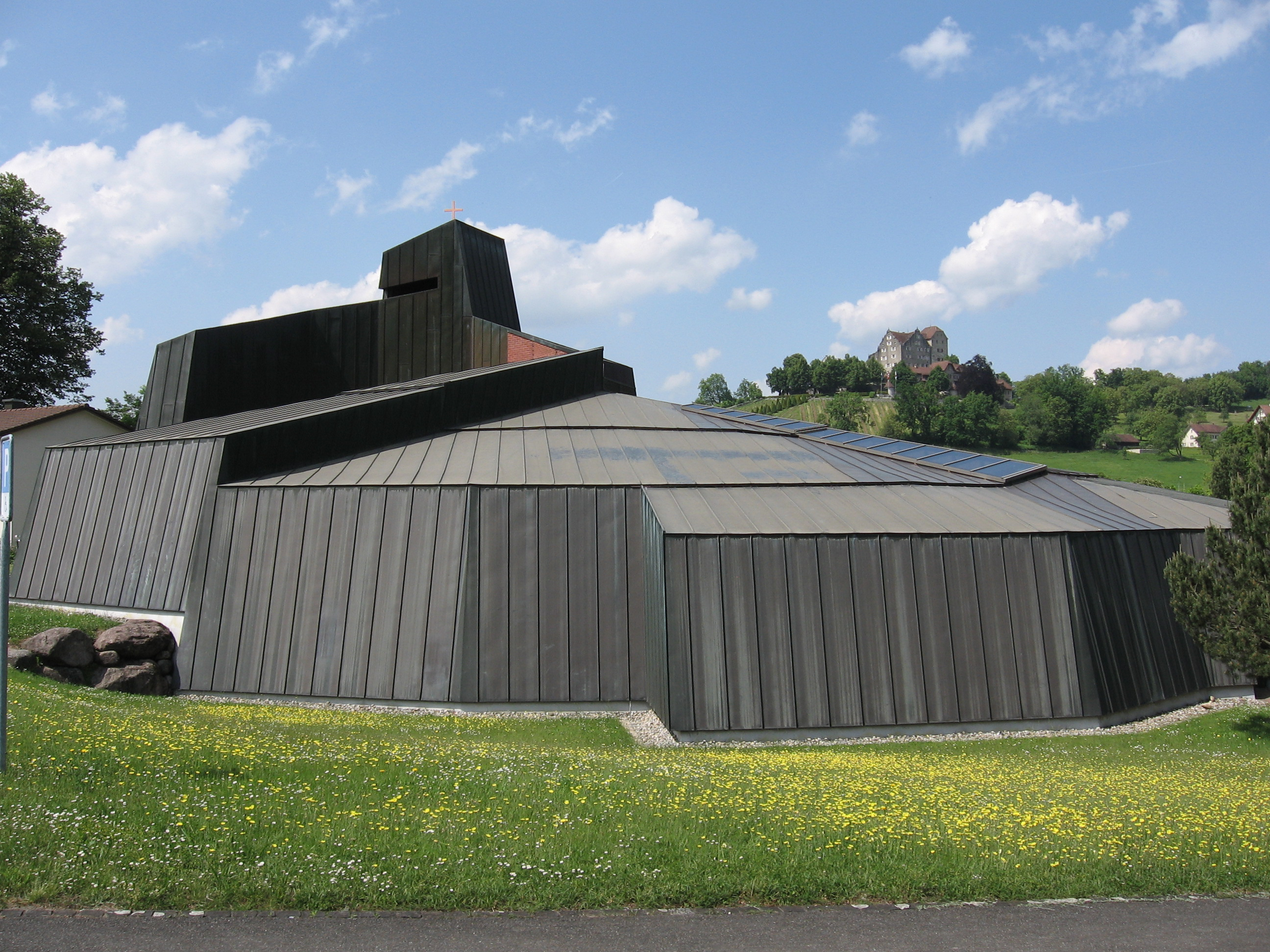 Church St. Antonius Wildegg, Switzerland (Architect: Justus Dahinden, 1970)